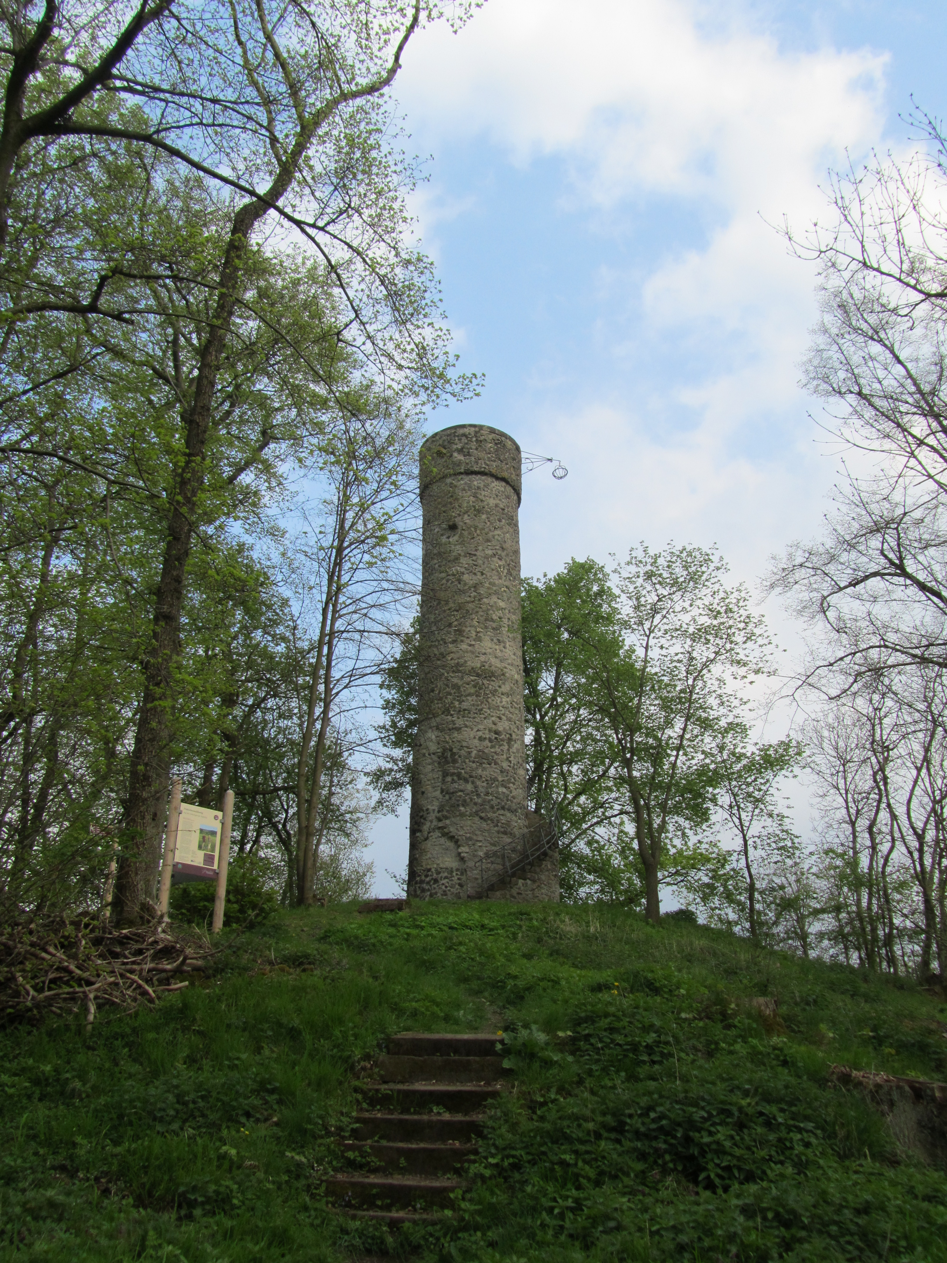 Der Schreckenbergturm bei Zierenberg in Hessen